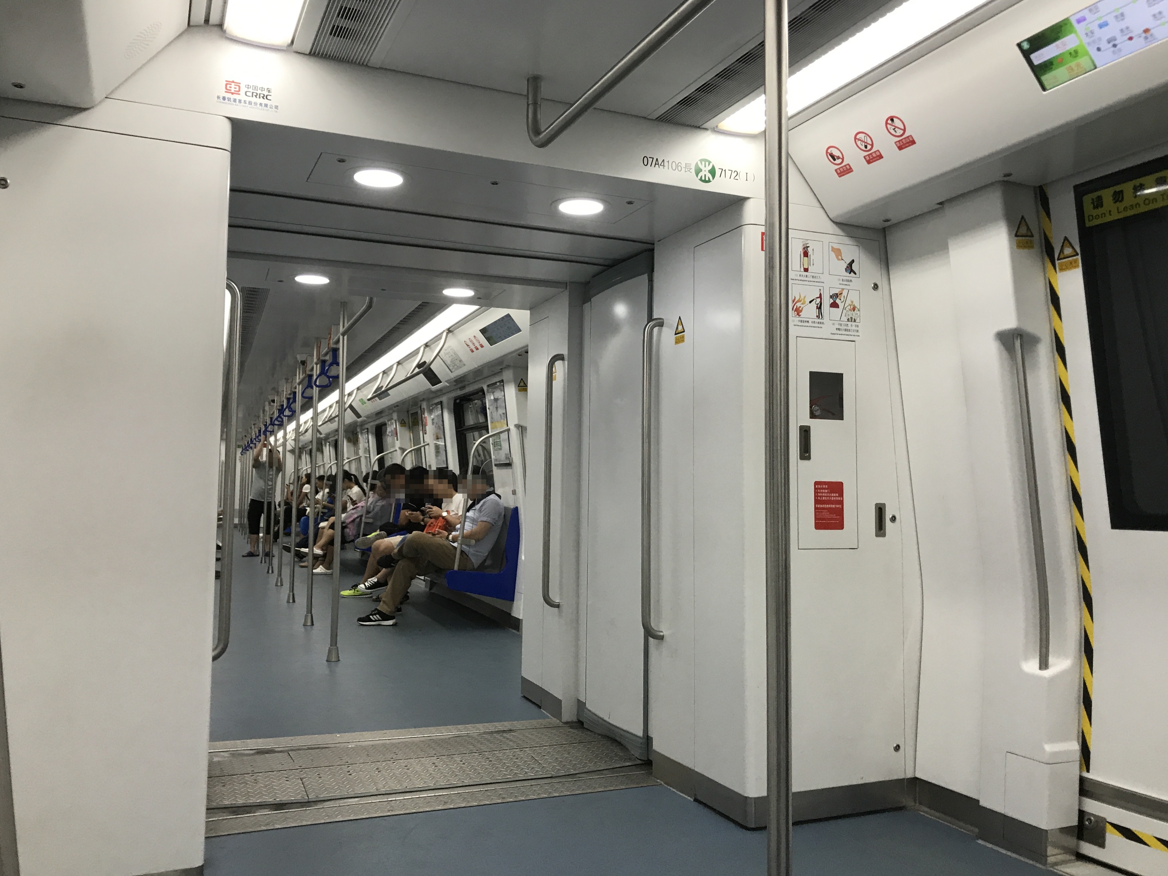 深圳地下鉄西麗線車内